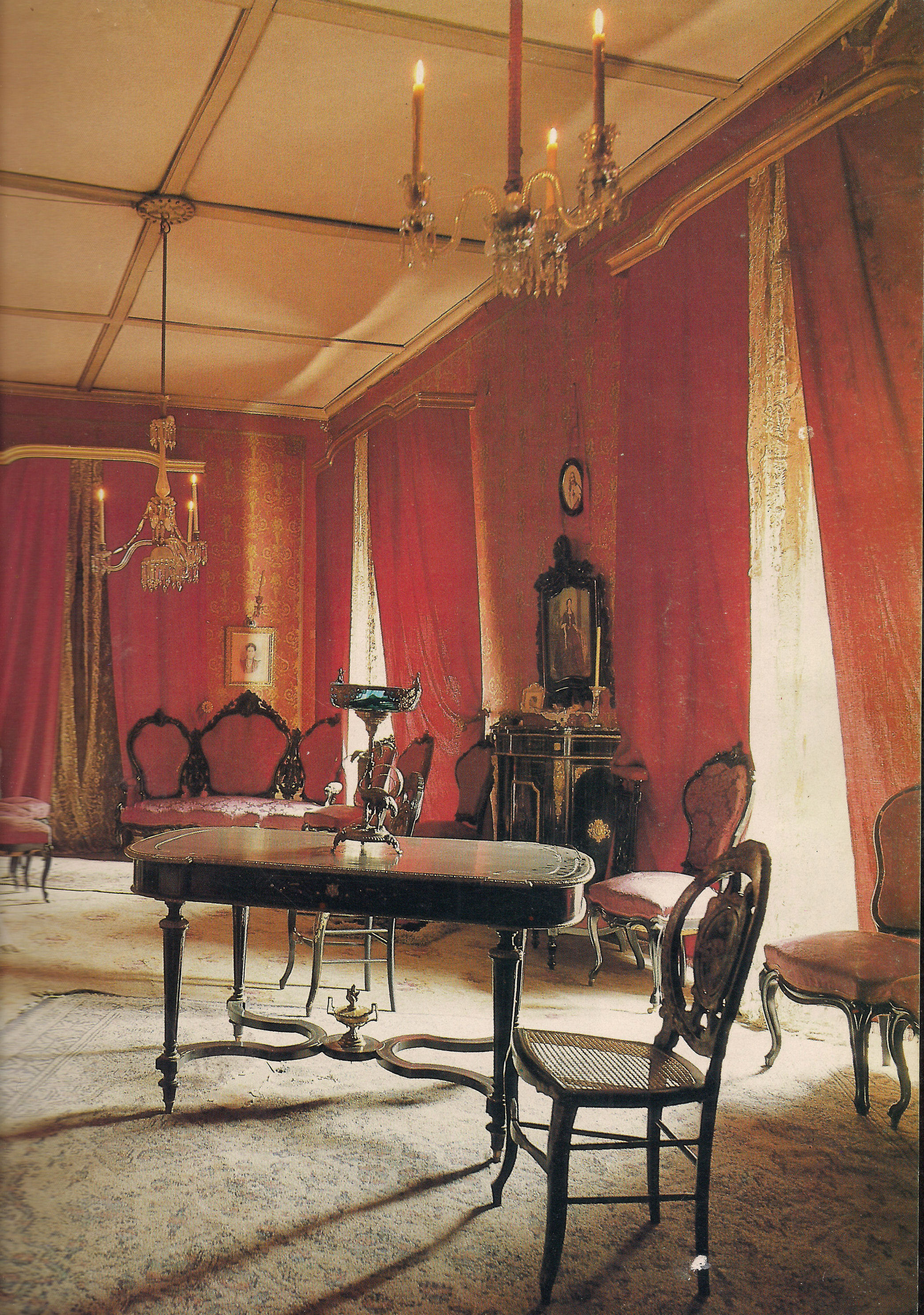 Panorámica parcial de la sala original del Museo Casa de Leguizamón